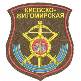 14-я ракетная Киевско-Житомирская ордена Кутузова III степени дивизия РВСН